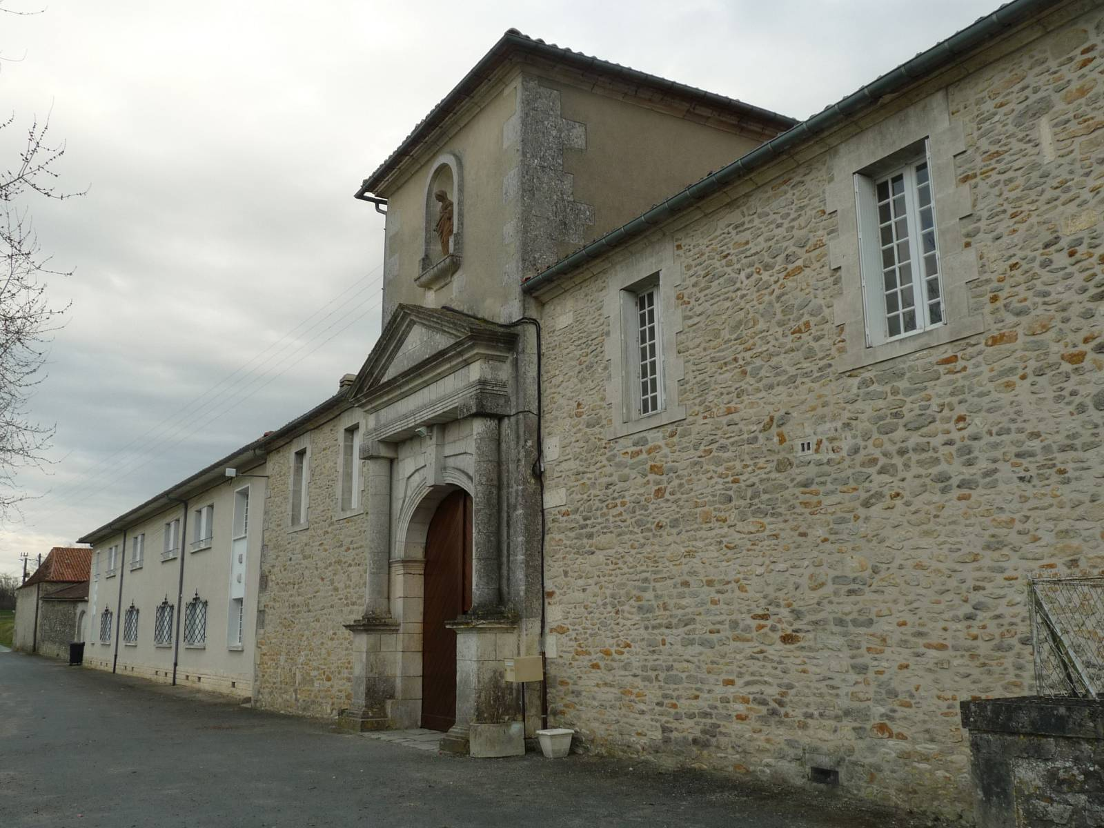 abbaye de Puypéroux, Charente, France